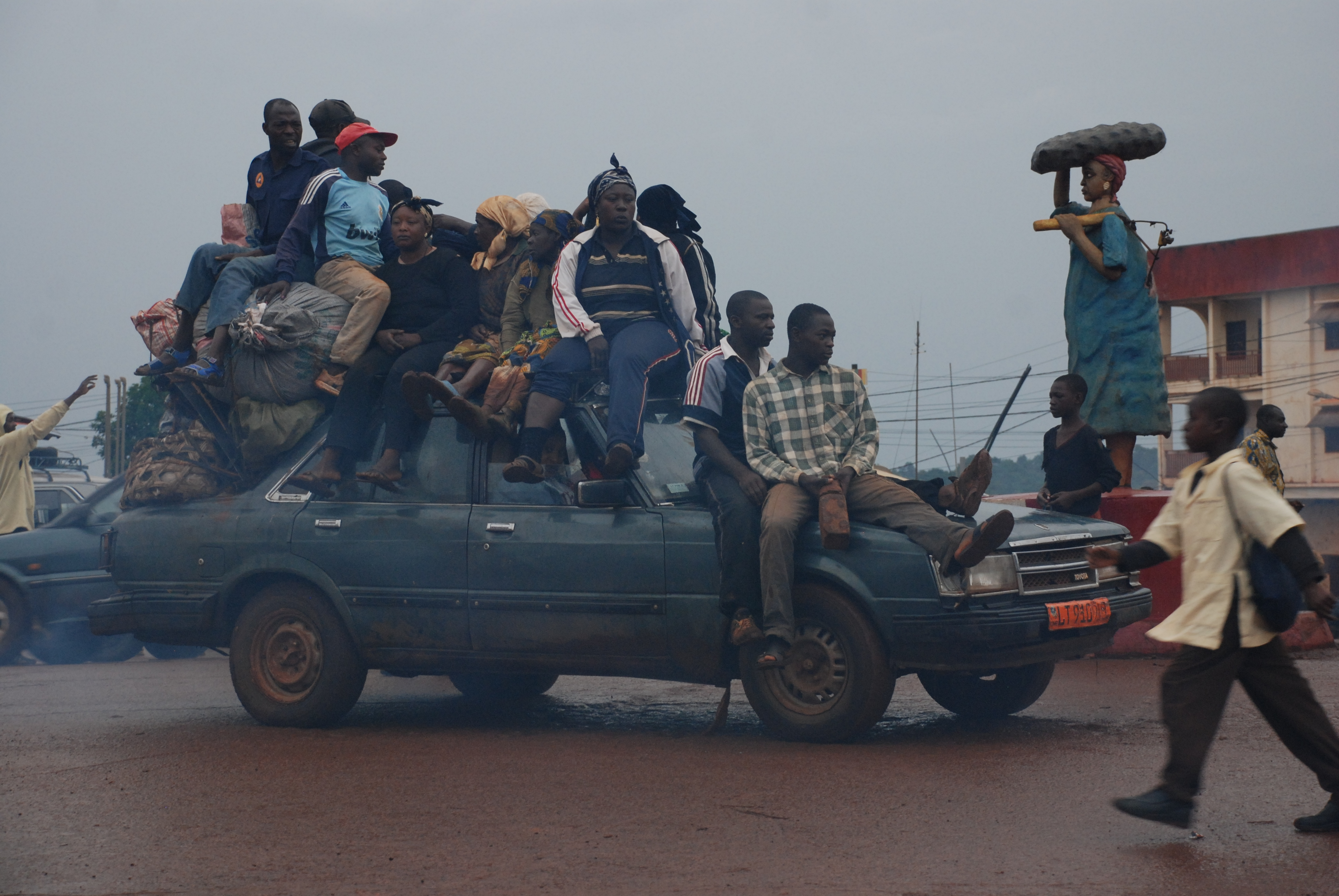 Une voiture CRESSIDA de 5 places aménagée spécialement pour transporter près de 20 personnes pour desservir les zones enclavées à Bouda au Cameroun. This is an image with the theme "Africa on the Move or Transport" from: Cameroon